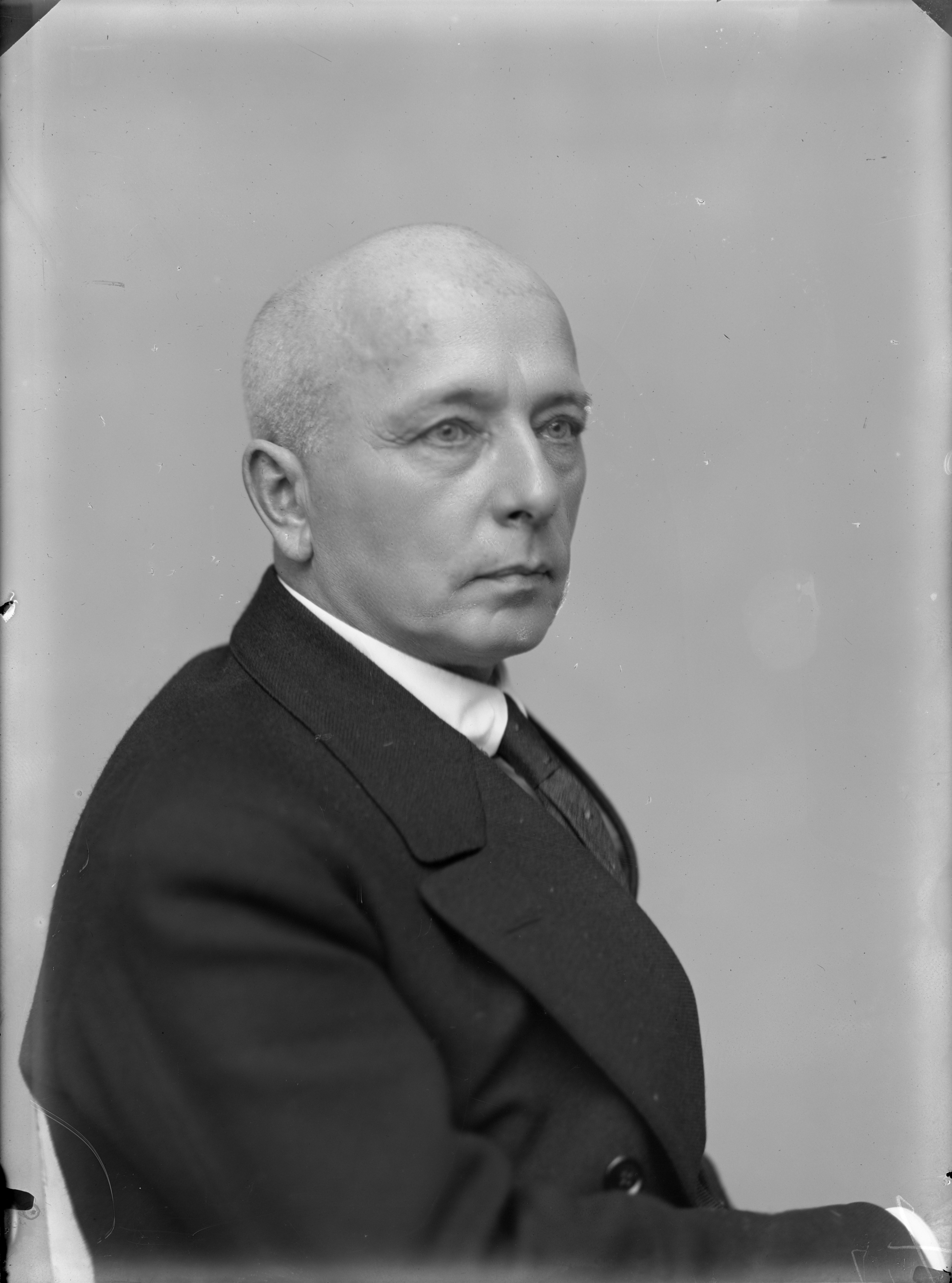 Eero Järnefelt